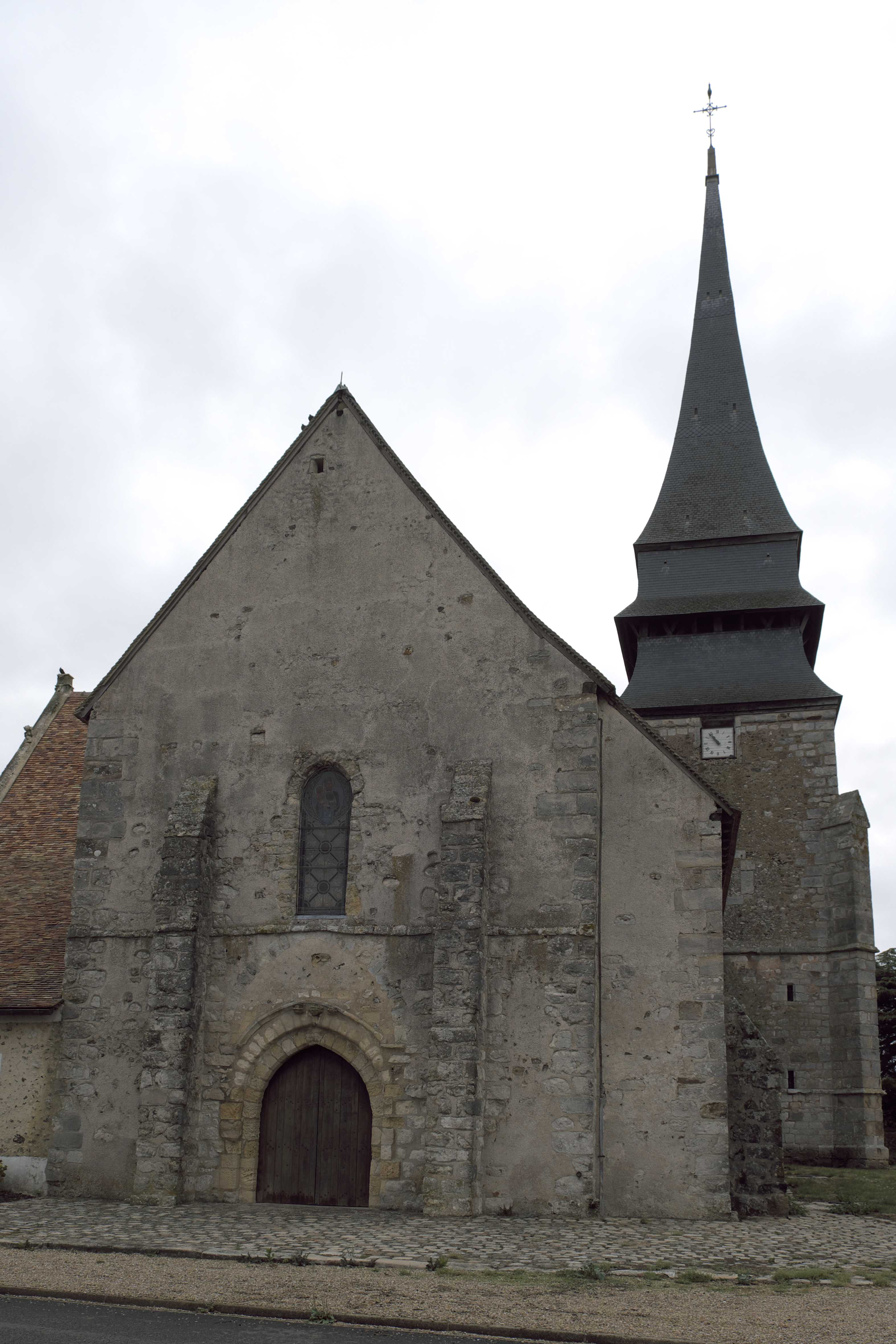 Katholische Pfarrkirche Notre-Dame in Bû im Département Eure-et-Loir (Centre-Val de Loire/Frankreich)